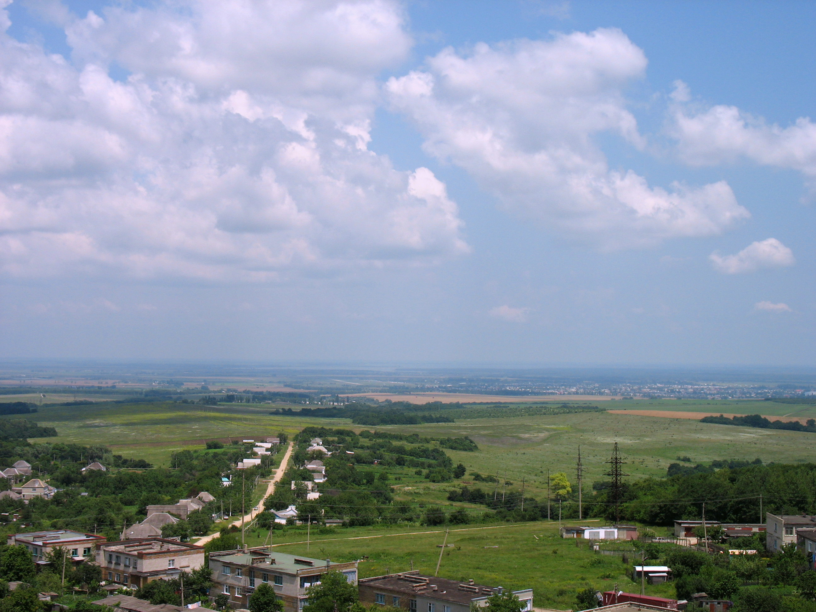 Хутор Горно-Весёлый